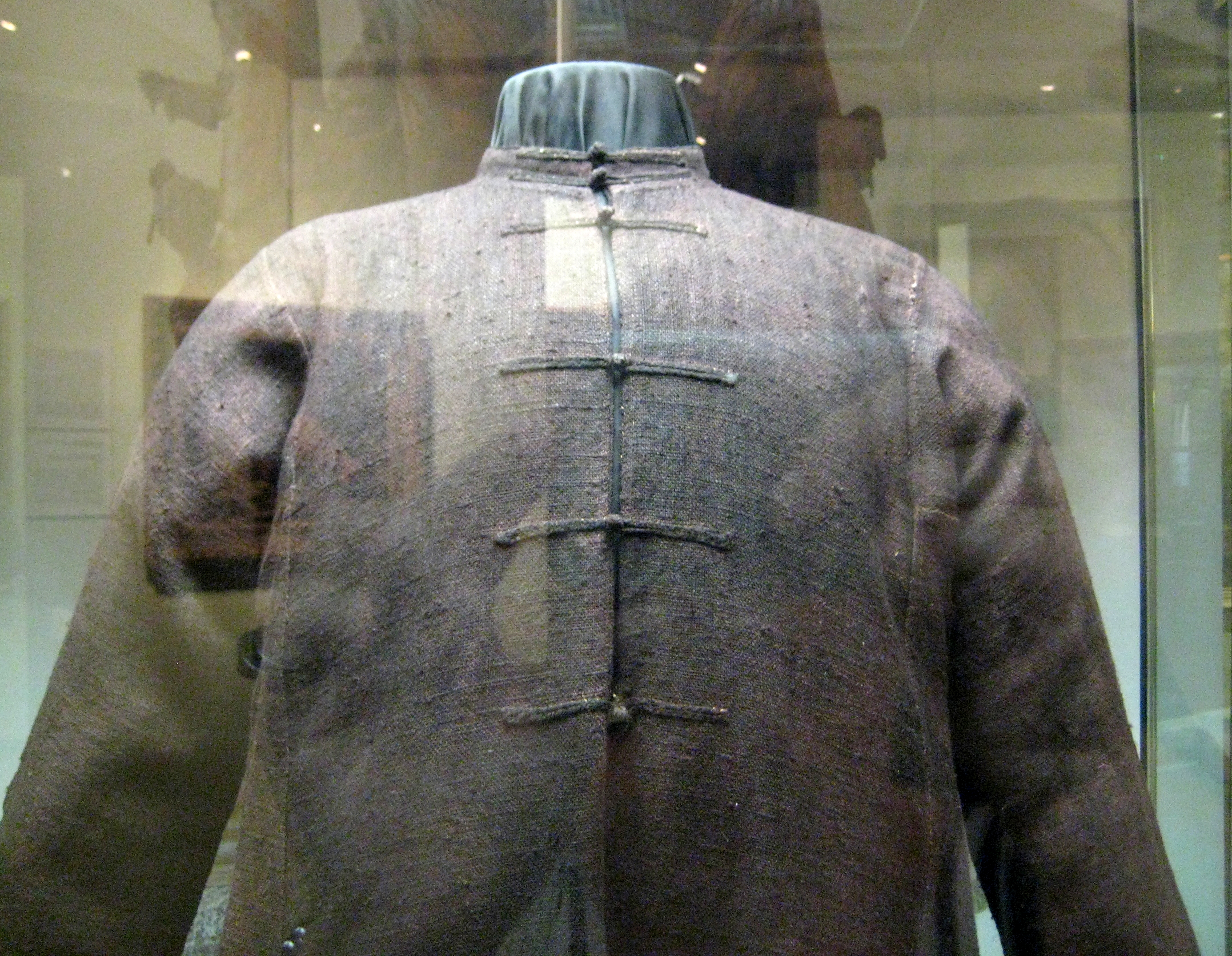 Власяница. Россия, 2-я пол. 16 в. Шерсть. Монашеская одежда. По преданию, принадлежала Ивану Грозному. Происходит из Александровской слободы. ГИМ.